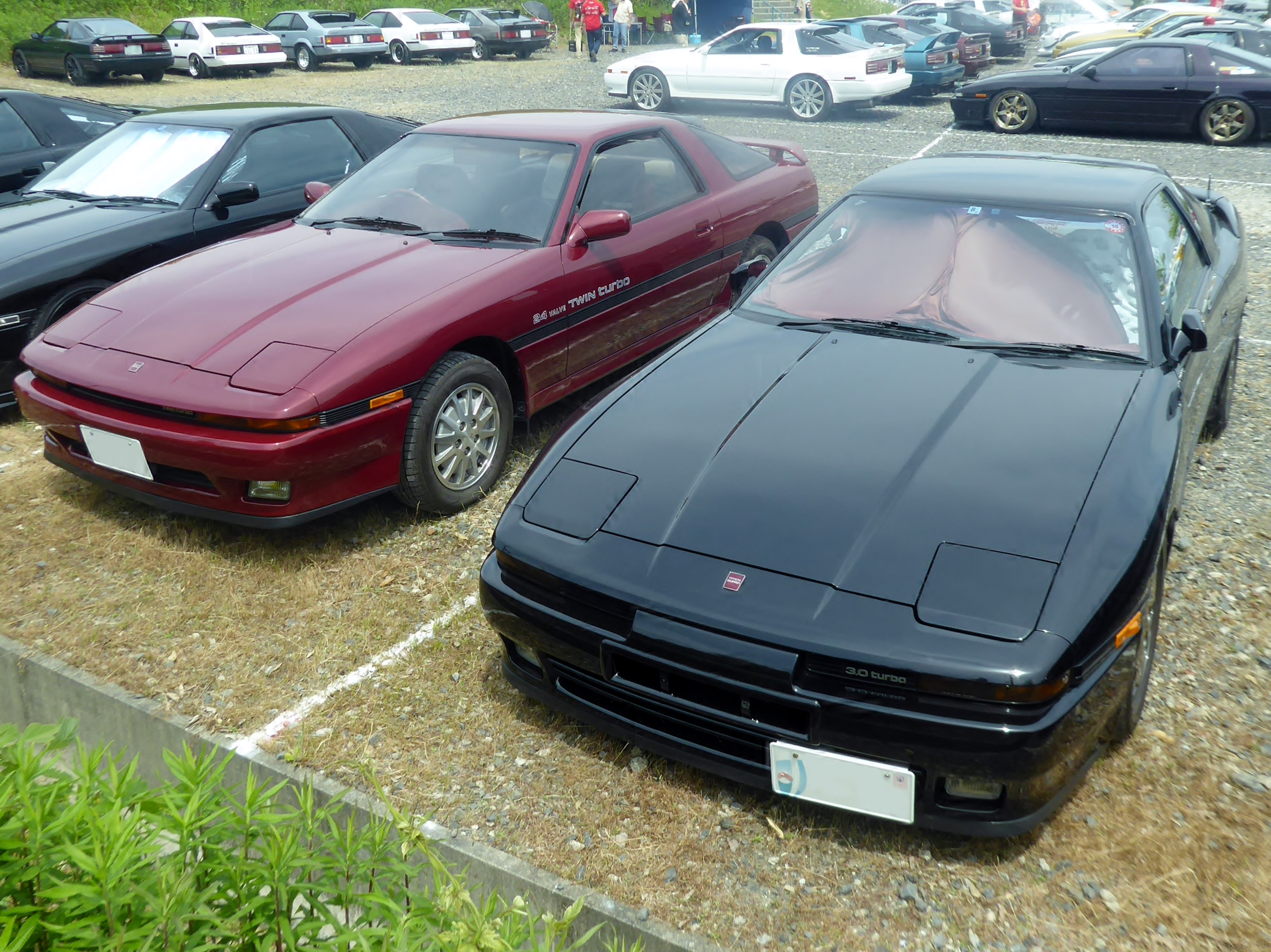 E-GA70型トヨタ・スープラ2.0GTツインターボ及びE-MA70型トヨタ・スープラ3.0GTターボAを撮影。